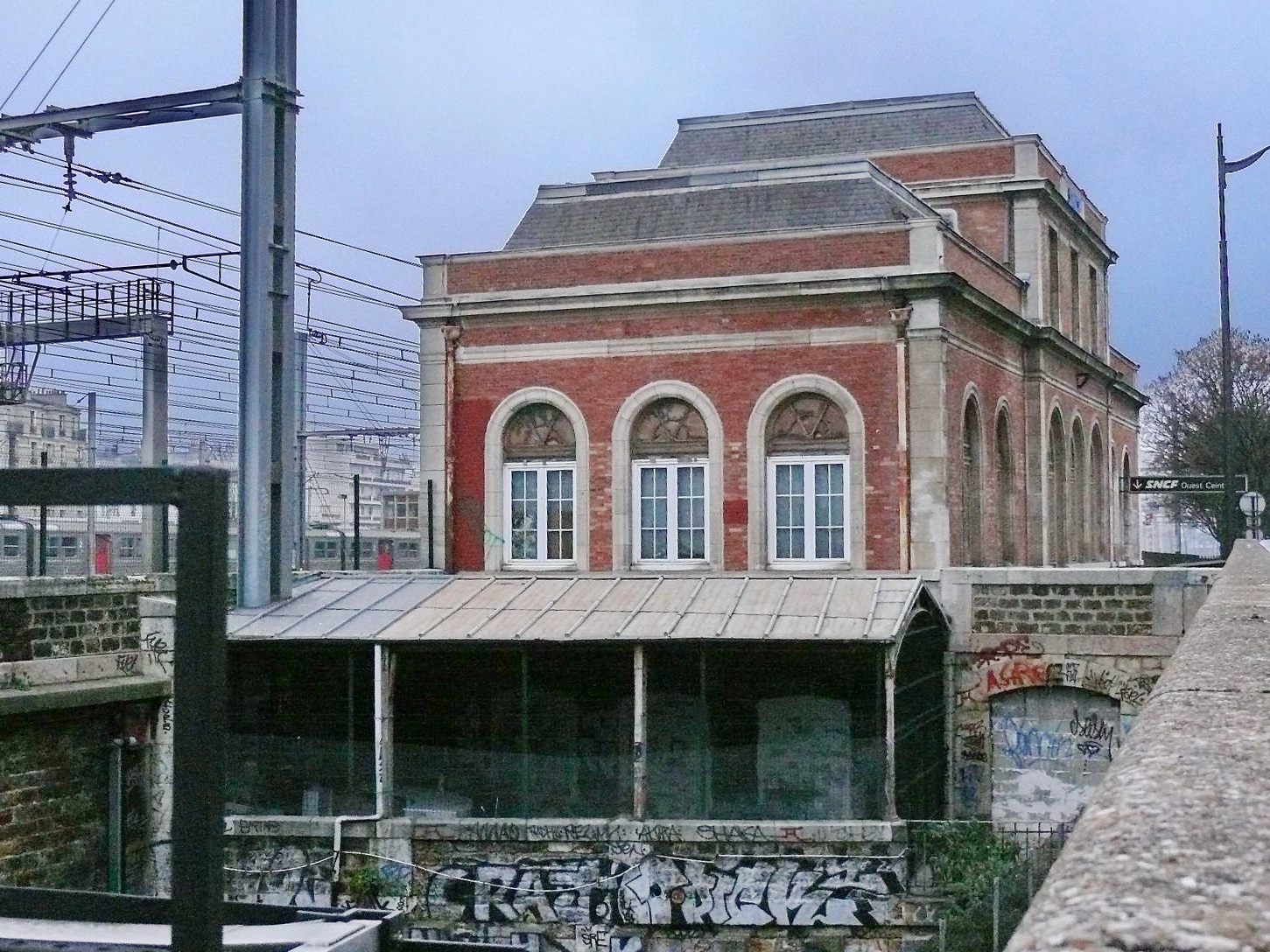 Paris : L'ancienne gare de Ouest-Ceinture, rue Vercingétorix, Paris 14e. Elle est ouverte le 10 septembre 1840 par la Compagnie du chemin de fer de Paris à Versailles rive gauche, est située sur la ligne Paris Montparnasse - Versailles RG et assurait la correspondance avec la Petite Ceinture. Sous le parapet du pont passe la ligne de Petite Ceinture, et, au niveau de la gare, les voies de la Gare Montparnasse.